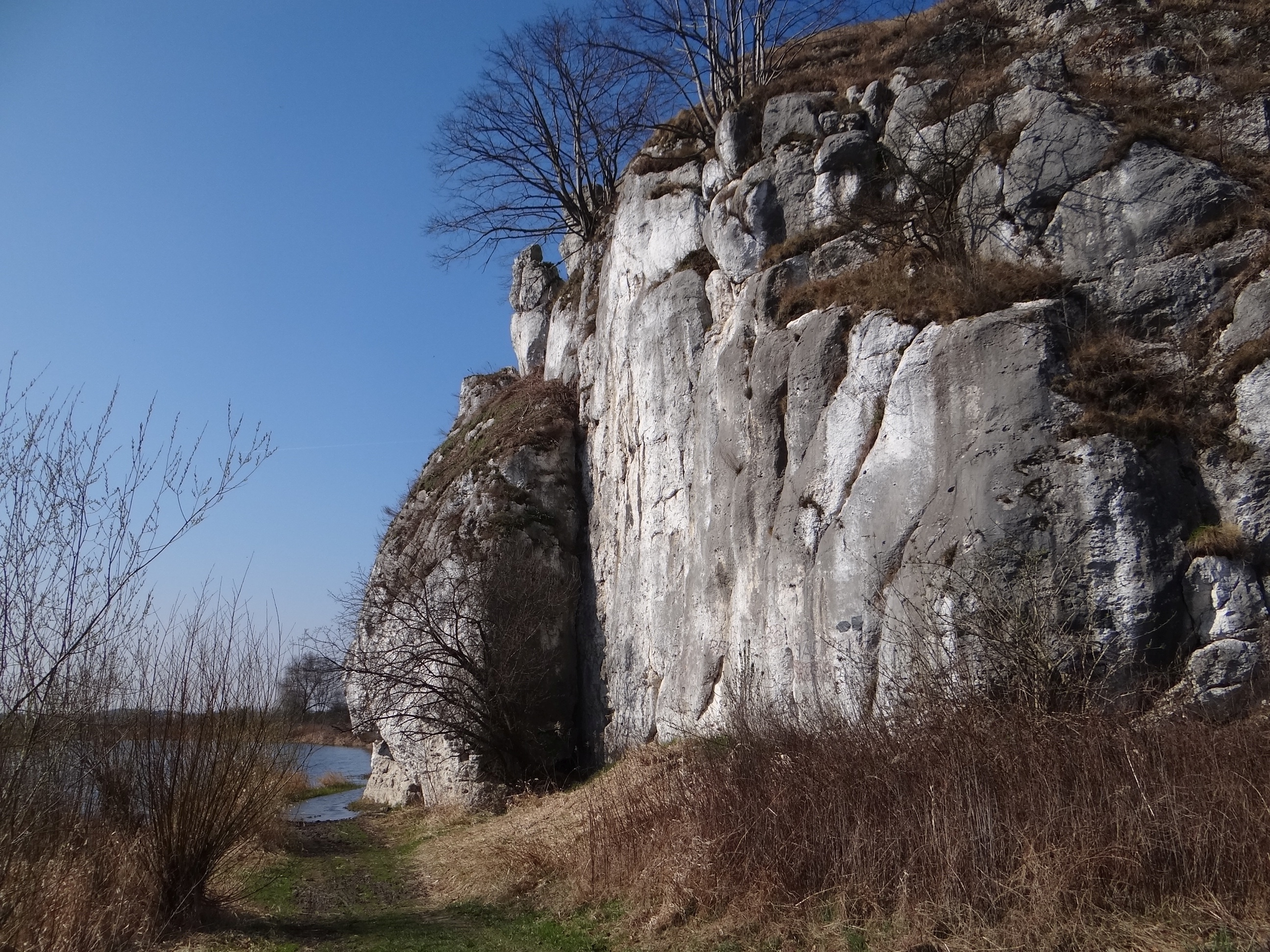 Skała Okrążek w grupie Skałek Piekarskich